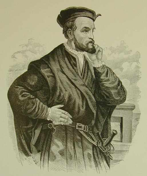 Jacques Cartier licence : infos : Gravure attribuée à Pierre-Louis Morin (1811-1886) vers 1854, d'après une toile de Théophile Hamel (1817-1870) peinte vers 1844 et d'après une toile (aujourd'hui perdue) de François Riss (1804-1886) peinte pour l'Hôtel-de-Ville de Saint-Malo en 1839... ; il n'existe aucun portrait authentique de Cartier !